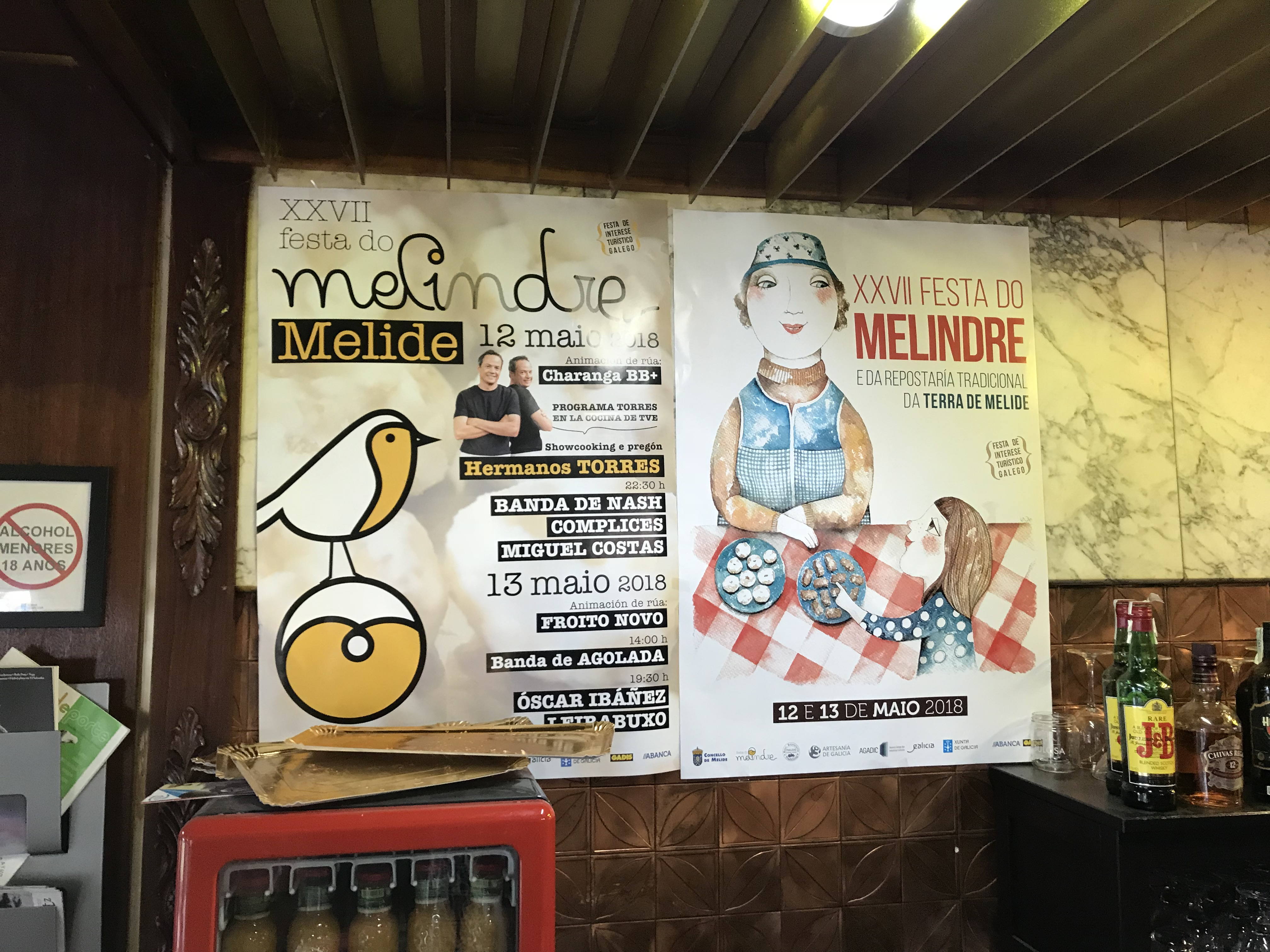 Carteis da Edición do ano 2018 da Festa do Melindre.